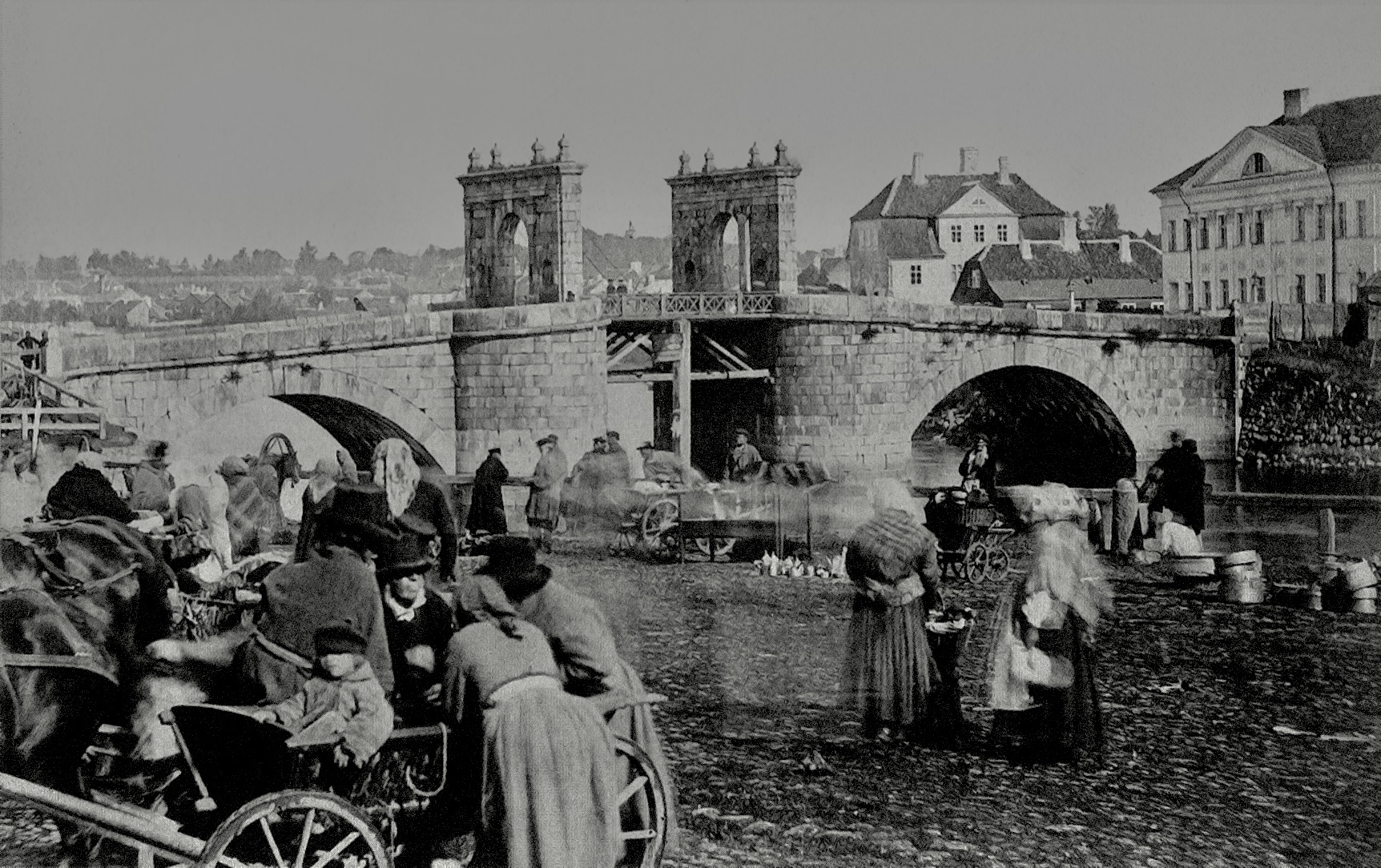 Kivisild